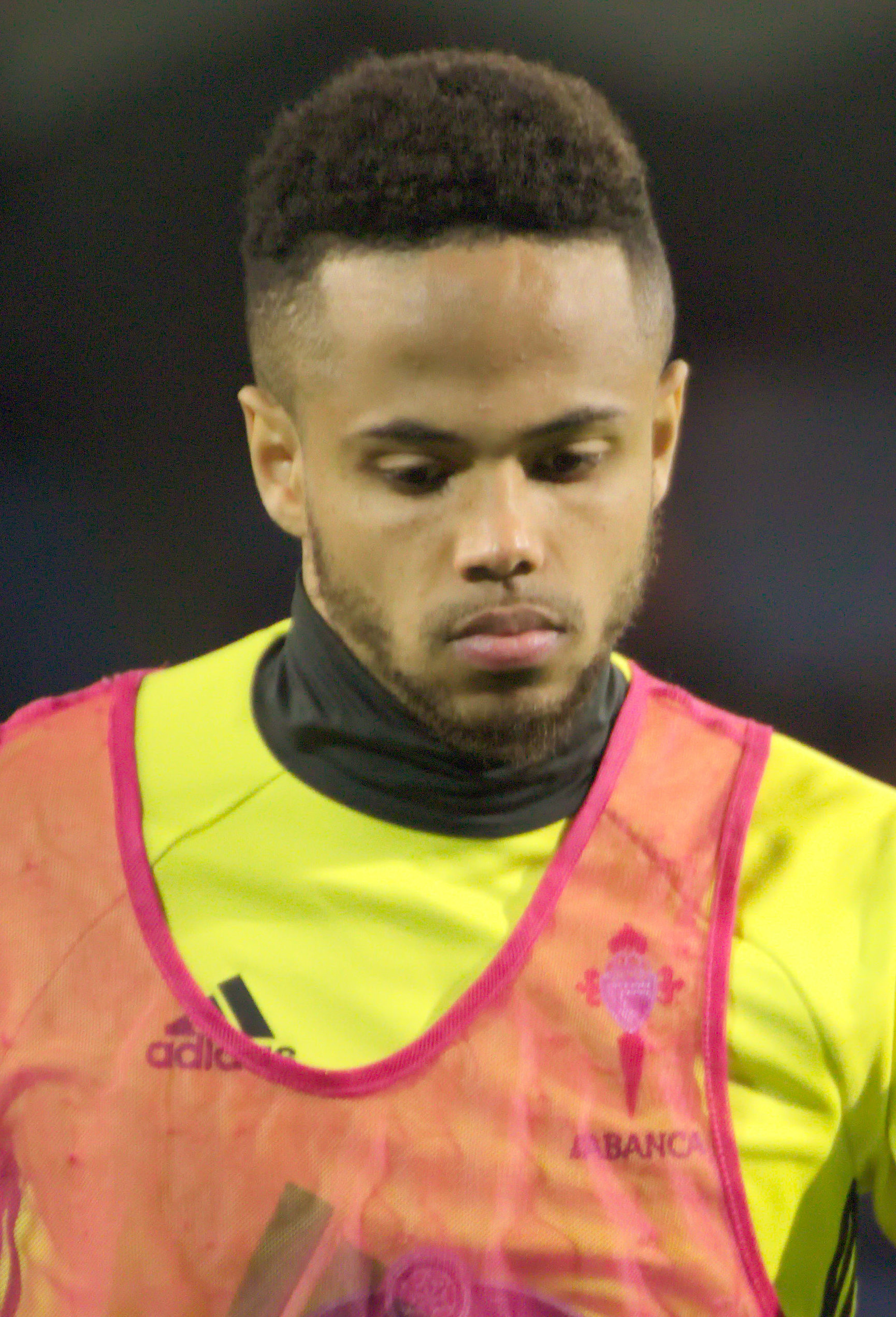 Théo Bongonda - Celta de Vigo